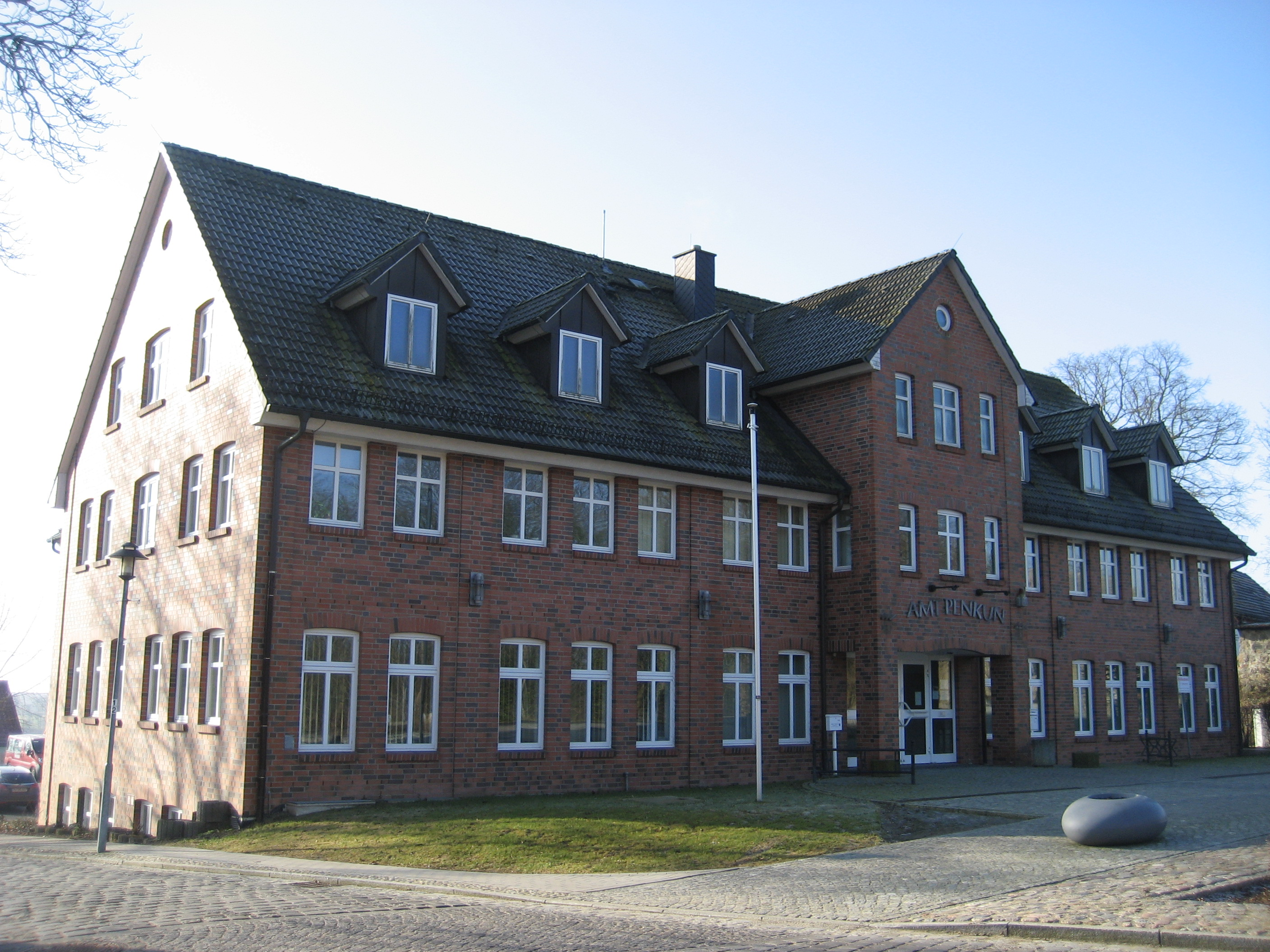 Gebäude des ehemaligen Amtes Penkun. Heute Außenstelle des Amtes Löcknitz-Penkun.